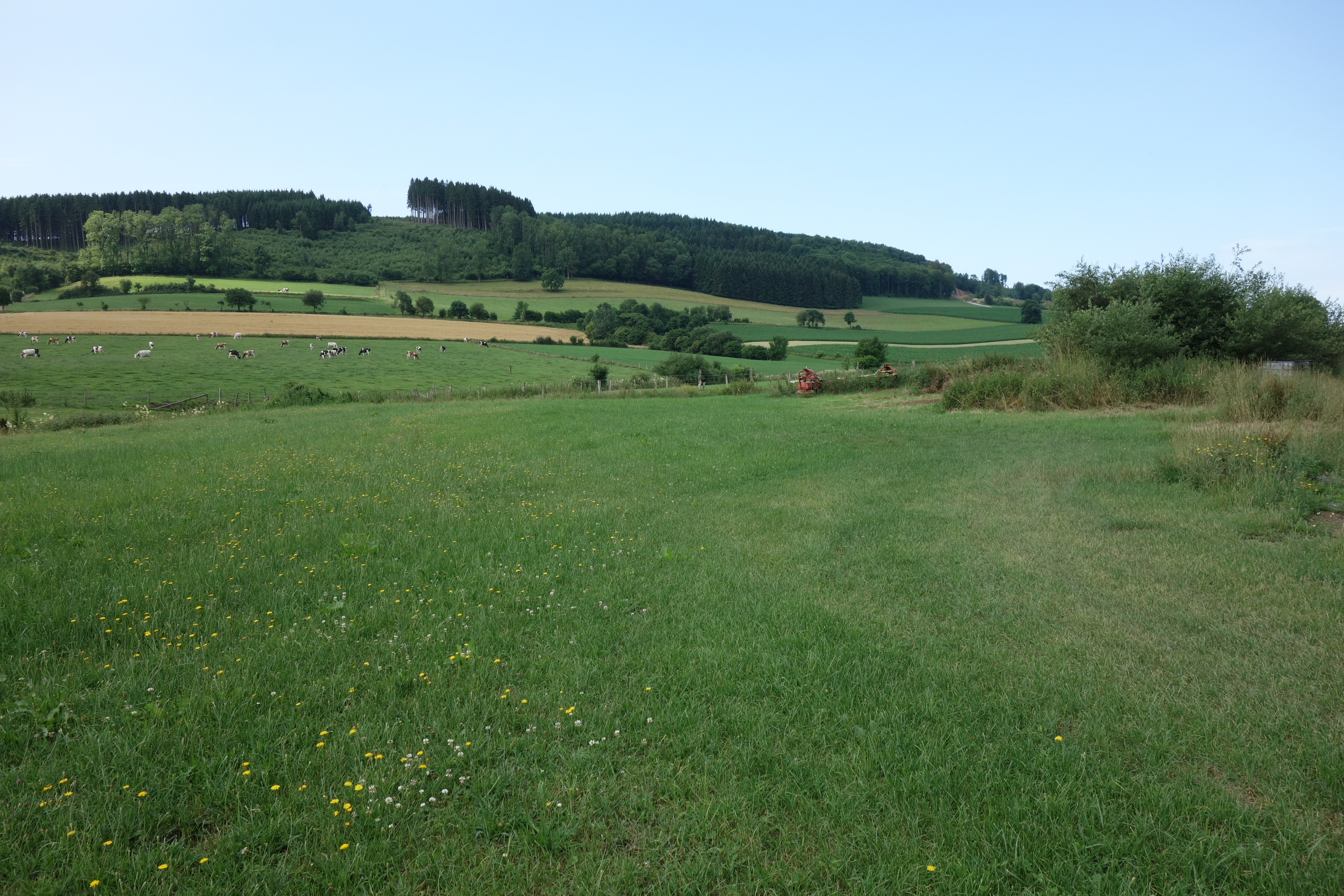 Offenland gehört zum "Landschaftsschutzgebiet Ortsrandlage südlich und östlich Olpe" (südwestlich von Olpe), Wald gehört zum LSG Meschede